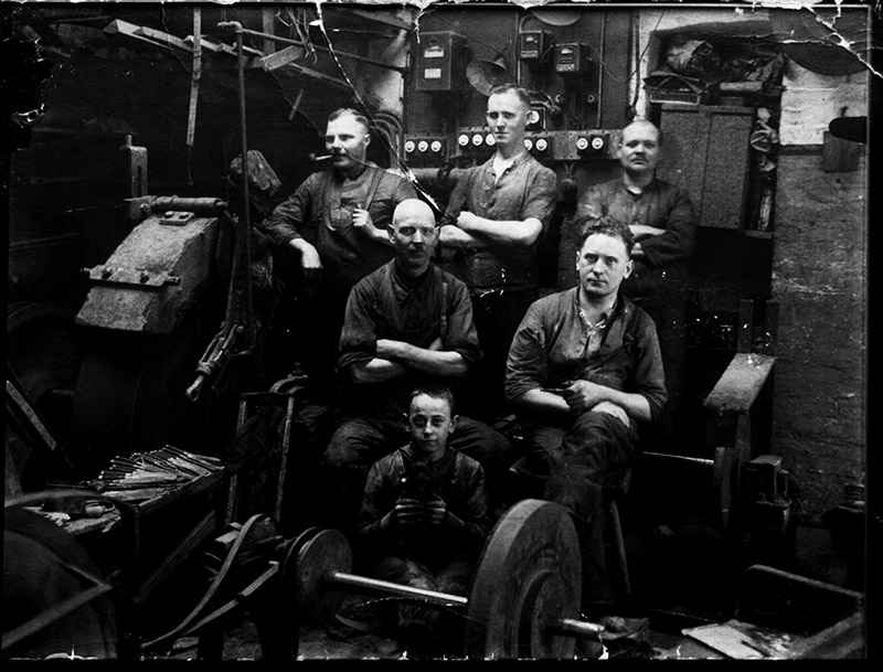 Unternehmen Franz Güde im Jahr 1915